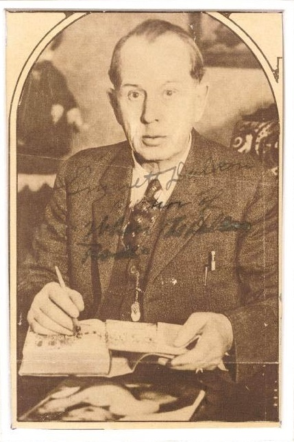 Emmett Dalton, en séance d’autographe En janvier 1931, le livre d'Emmett Dalton "When the Daltons Rode", écrit en collaboration avec Jack Jungmeyer, est publié.